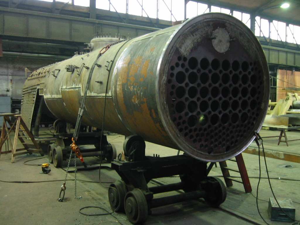 Langkessel eines 39E während der Instandsetzung